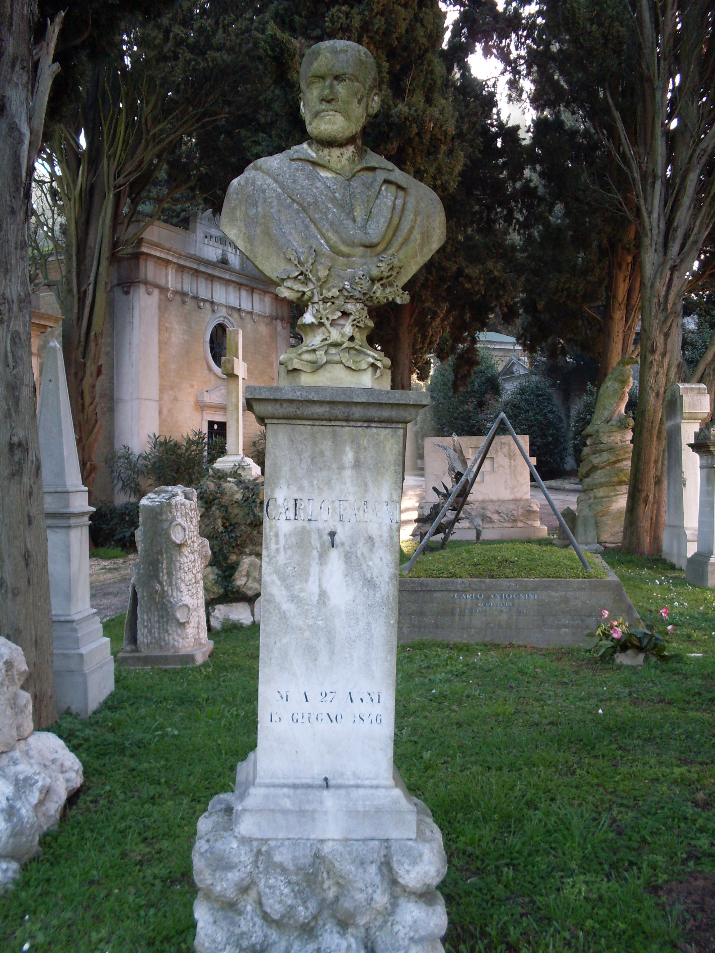 Tomba di Carlo Faiani - 1818-1846 - patriota educatore